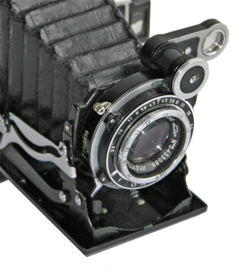 Mosckov-2 Lens